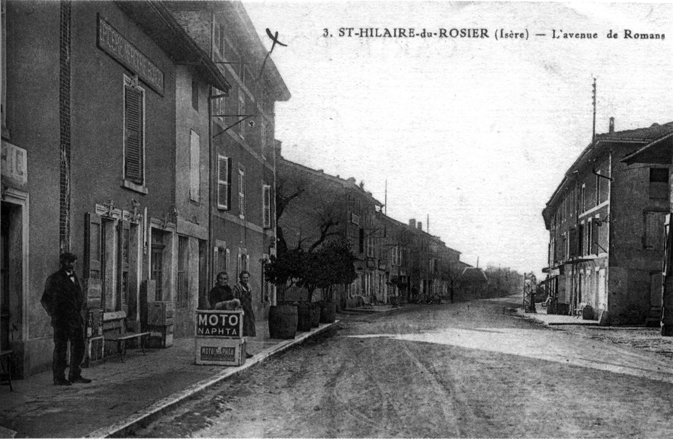 Saint-Hilaire-du-Rosier, l'avenue de Romans, vers 1930